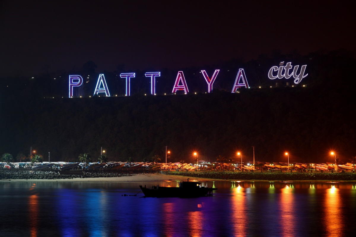 Pattaya at night